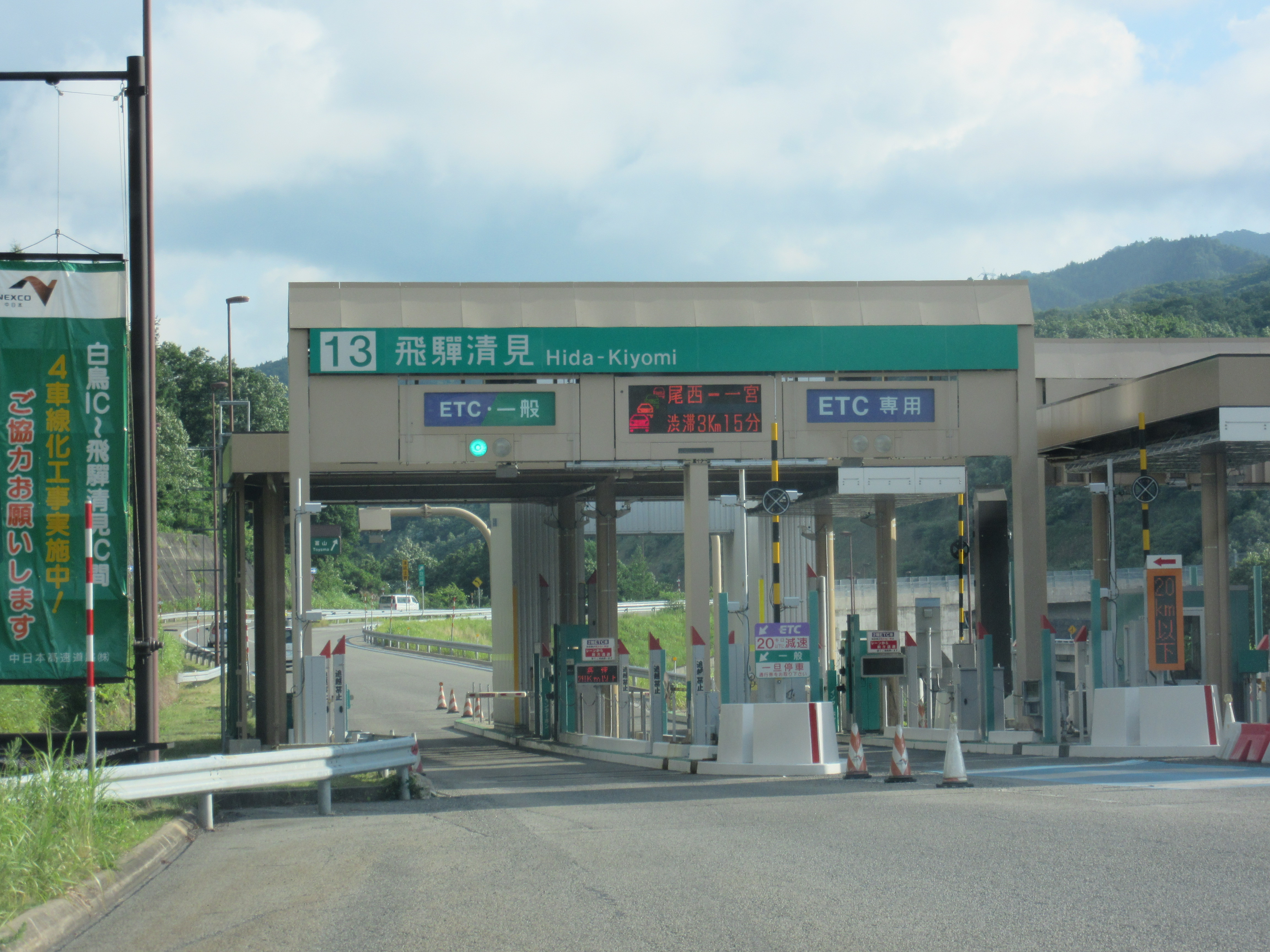 飛騨清見インターチェンジ